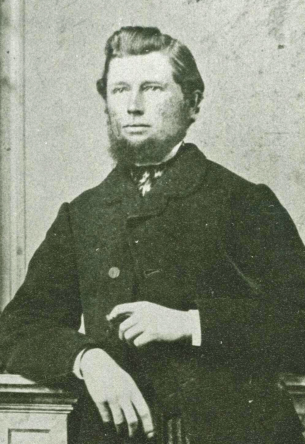 Portet van Geuchien Zijlma (1842-1922), uitsnede uit bronbestand